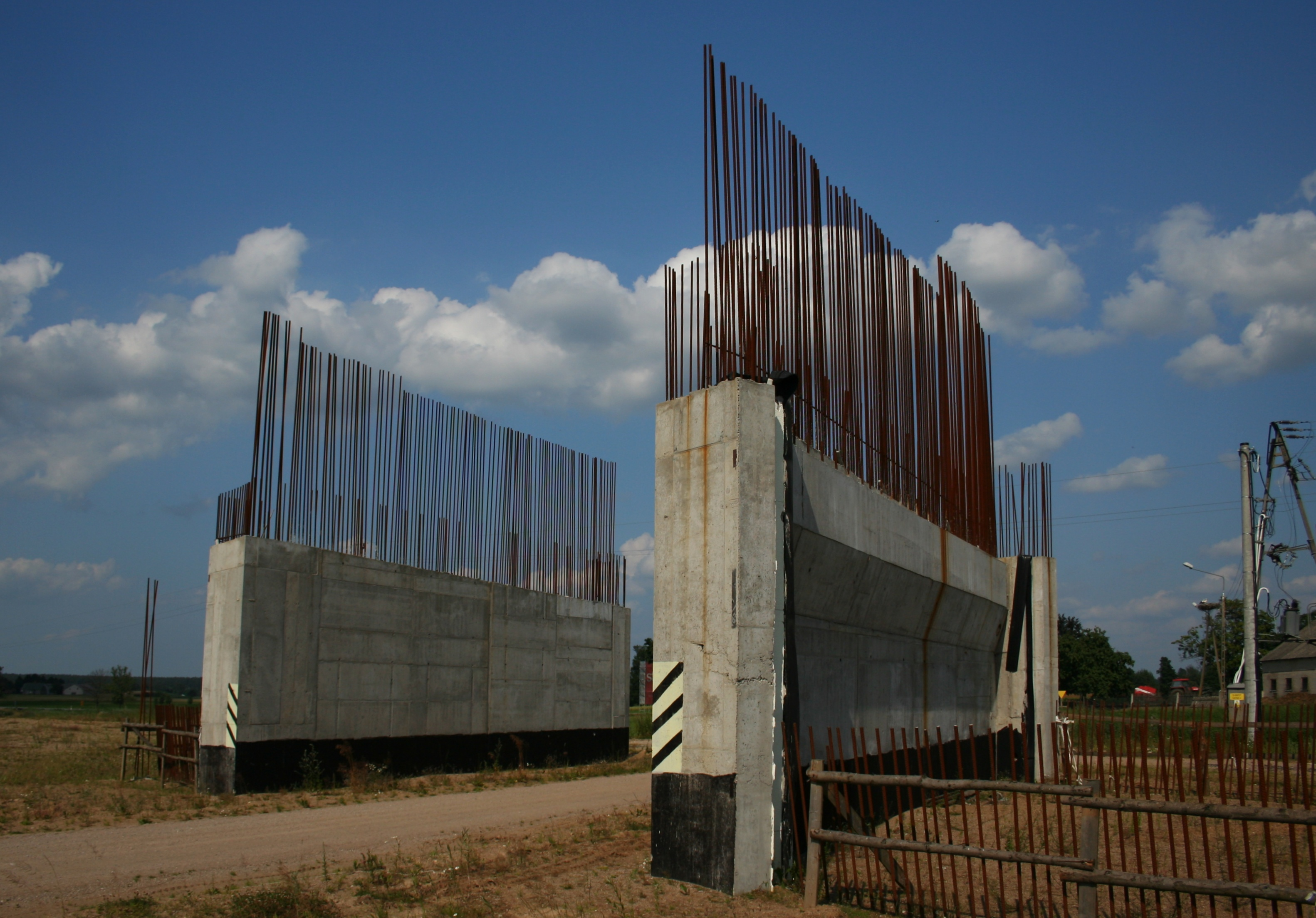 fragment szkieletu niedokończonej budowy obwodnicy Augustowa, Gatno